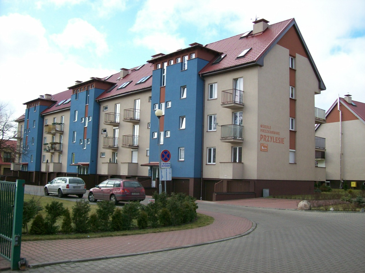 Budynki mieszkaniowe na os.Przylesie w Świnoujściu